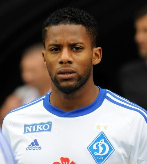 Джермейн Ленс в своєму дебютному матчі за Динамо (Київ)